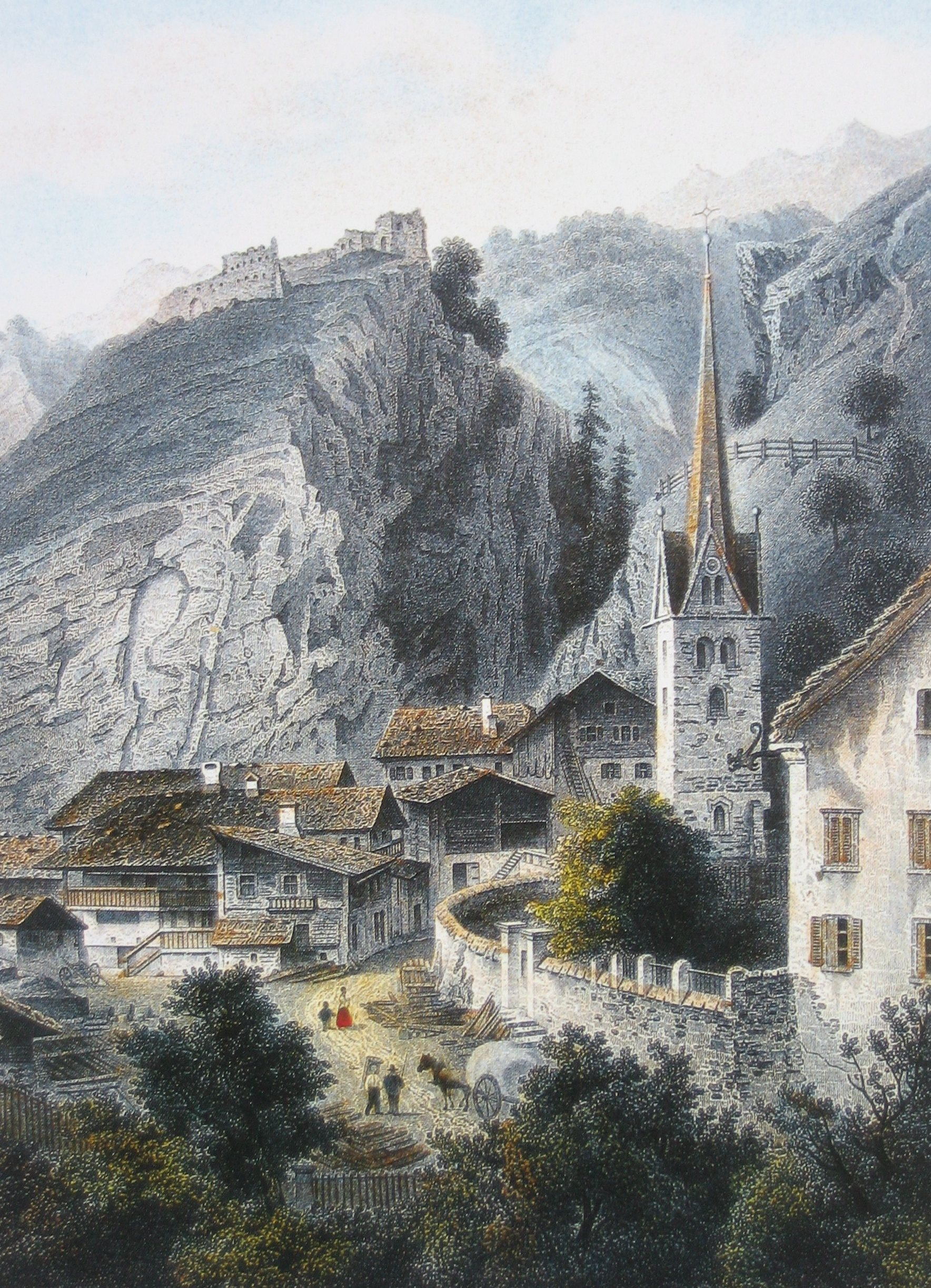 Grüsch um 1860, im Hintergrund die Ruine Solavers. Ansicht von Südosten. Kol. Stahlstich von Ludwig Rogbock und Friedrich Julius Umbach